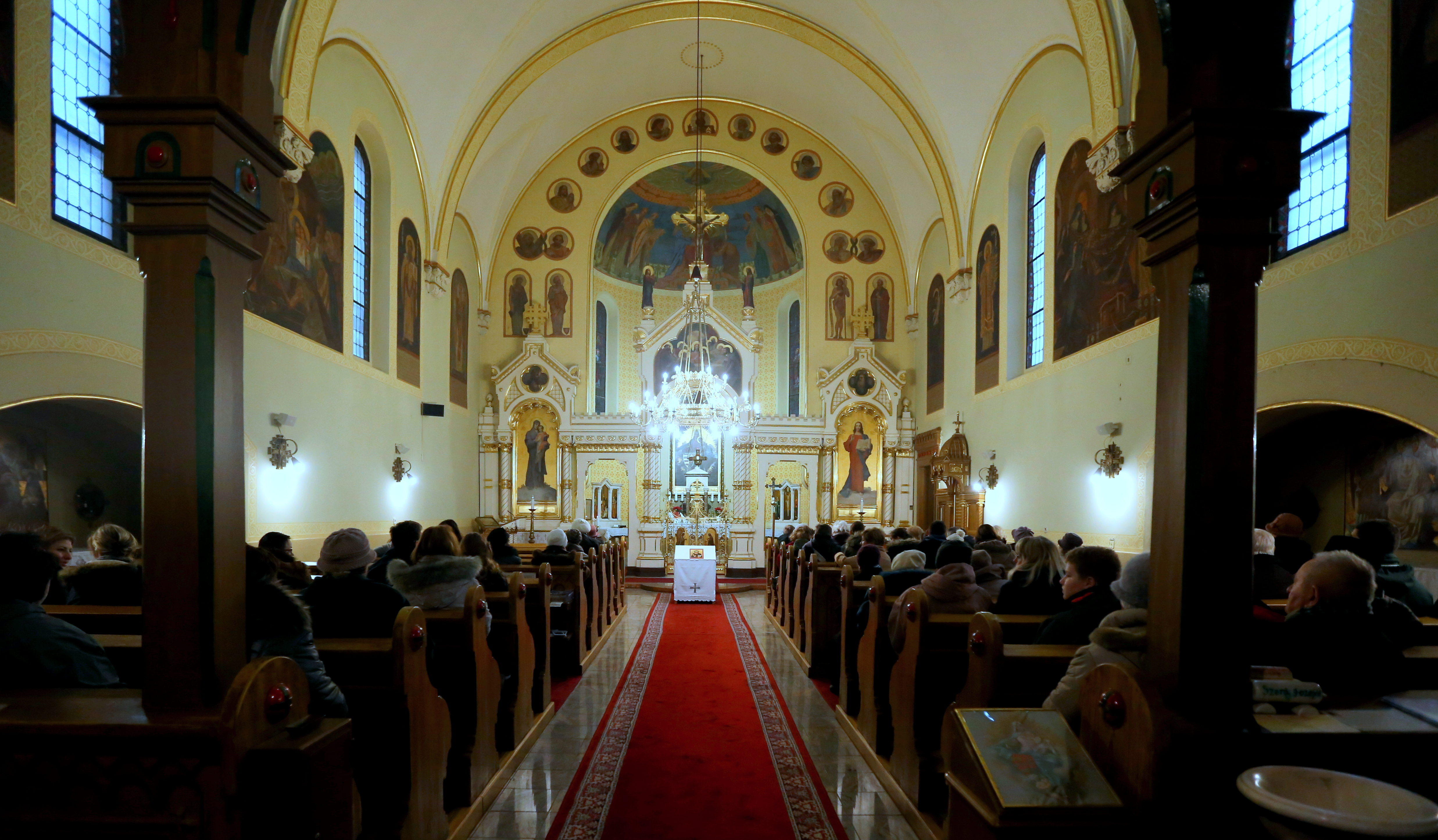 Rózsák terei Istenszülő Oltalma görög katolikus templom